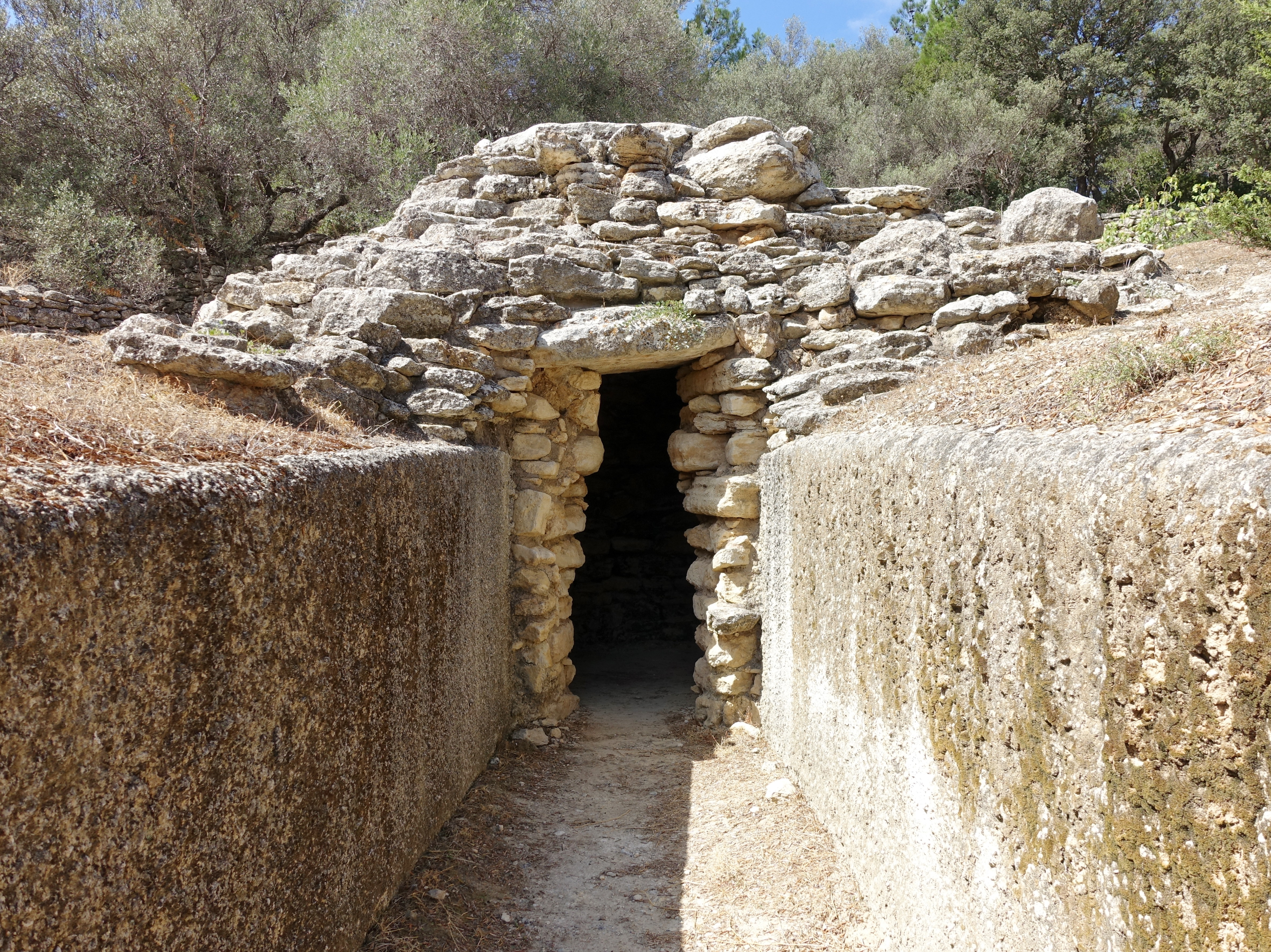 Kuppelgrab A in Phourni (Φουρνί), Gemeinde Archanes-Asterousia, Kreta, Griechenland